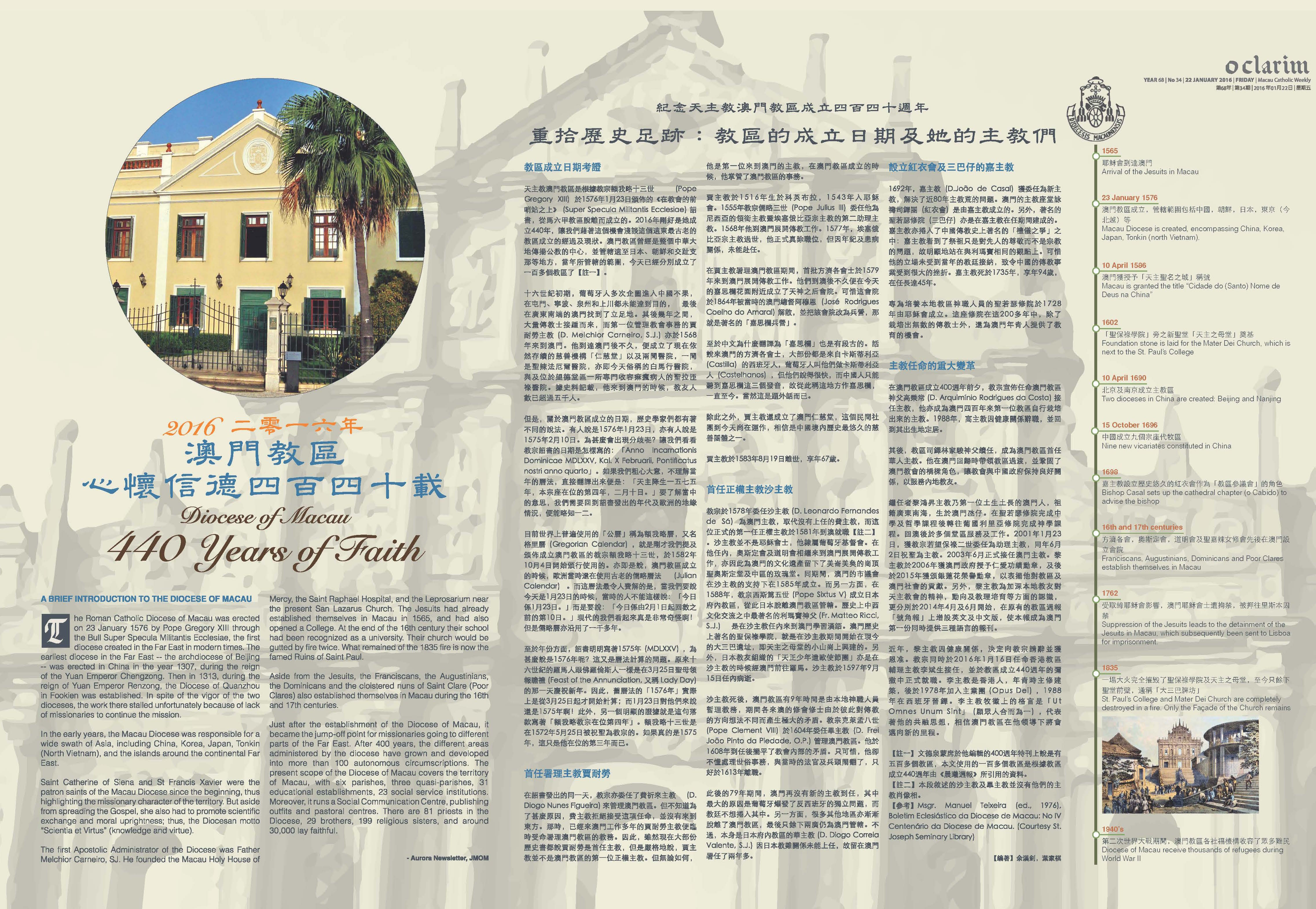 天主教澳門教區成立440周年特刊內文 Diocese of Macau 440th Anniversary Special Edition content